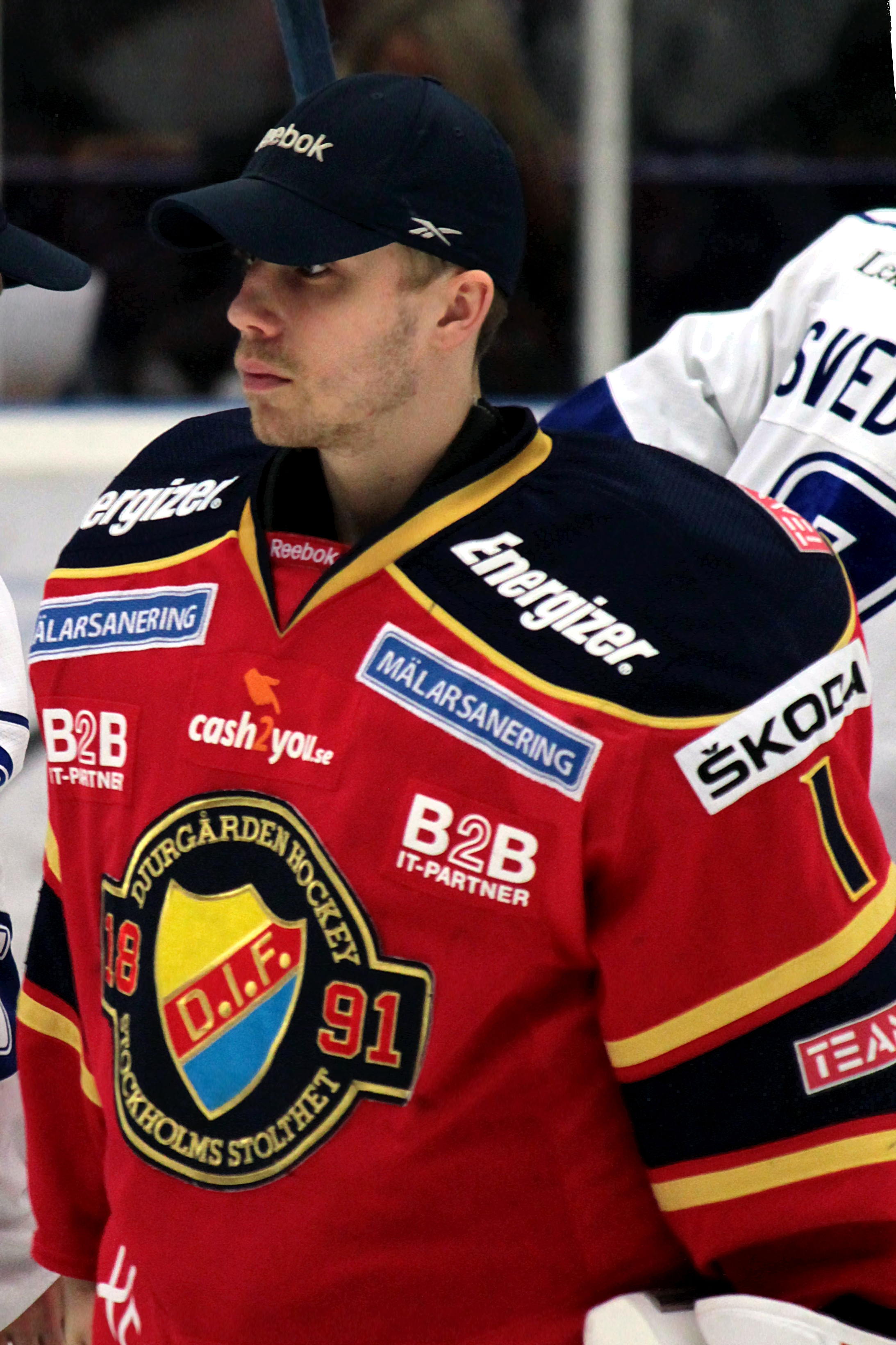 Tim Sandberg i kvalmatchen mellan Leksands IF och Djurgårdens IF i Leksand 2012-03-31